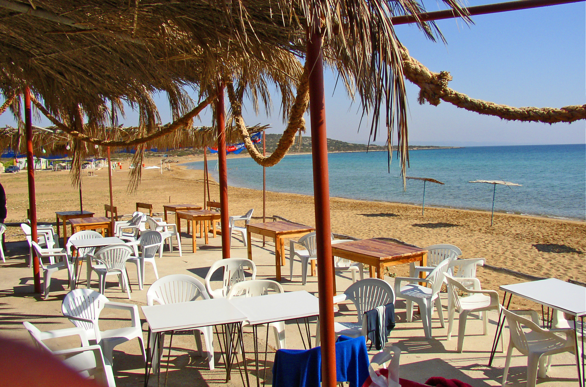 Morgendlicher Strand in der Nähe von Mehmetcik (Nord Cypern) 2003